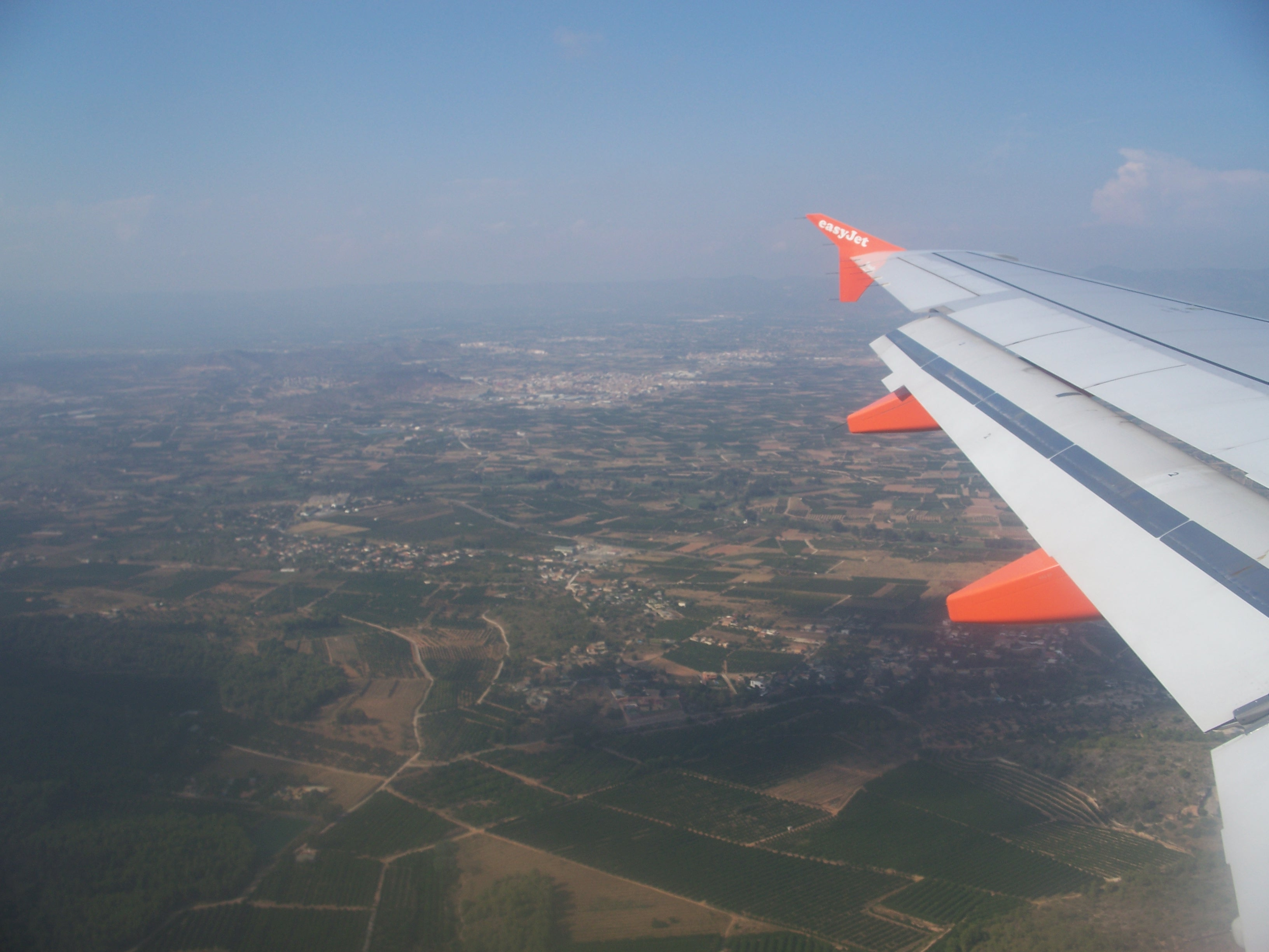 Aterratge en l'aeroport de València.